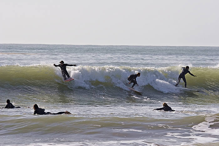 Spot de La Pergola - La Couarde-sur-Mer - île de Ré - Charente-Maritime Photo issue de ma banque d'images : Pep.per 8 octobre 2006 à 00:29 (CEST)